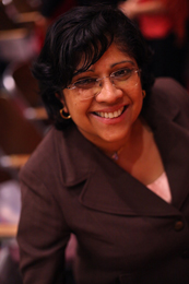 Photograph of Radhika Balakrishnan